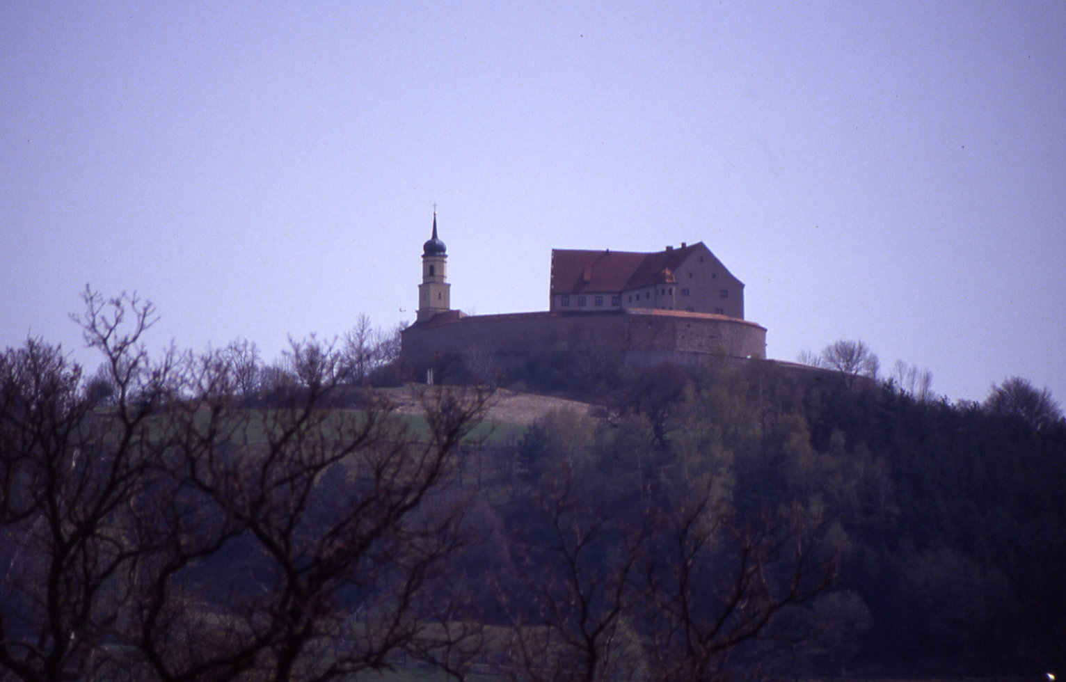 Burg Spielberg (WUG): Blick von Gnotzheim auf die Burg